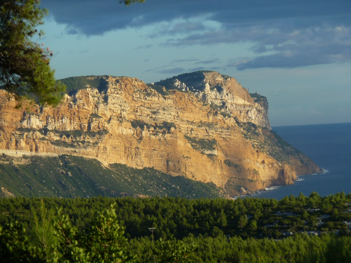 Vue du Cap Canaille (Cassis - France) depuis le col de la Gardiole